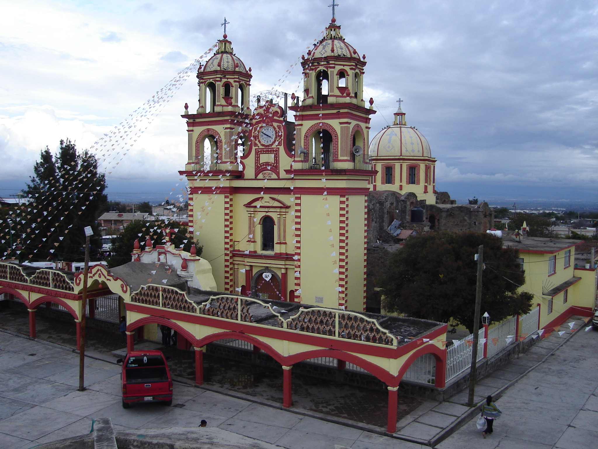 Templo católico de Santiago Xaltepetlapa, Domingo Arenas, Puebla.